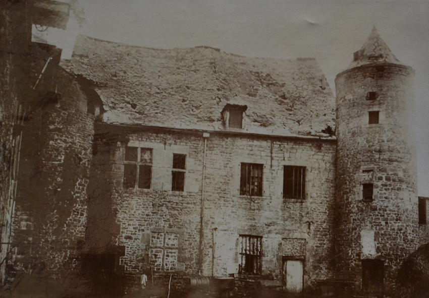 Château de Gougnies avant sa démolition en 1906.